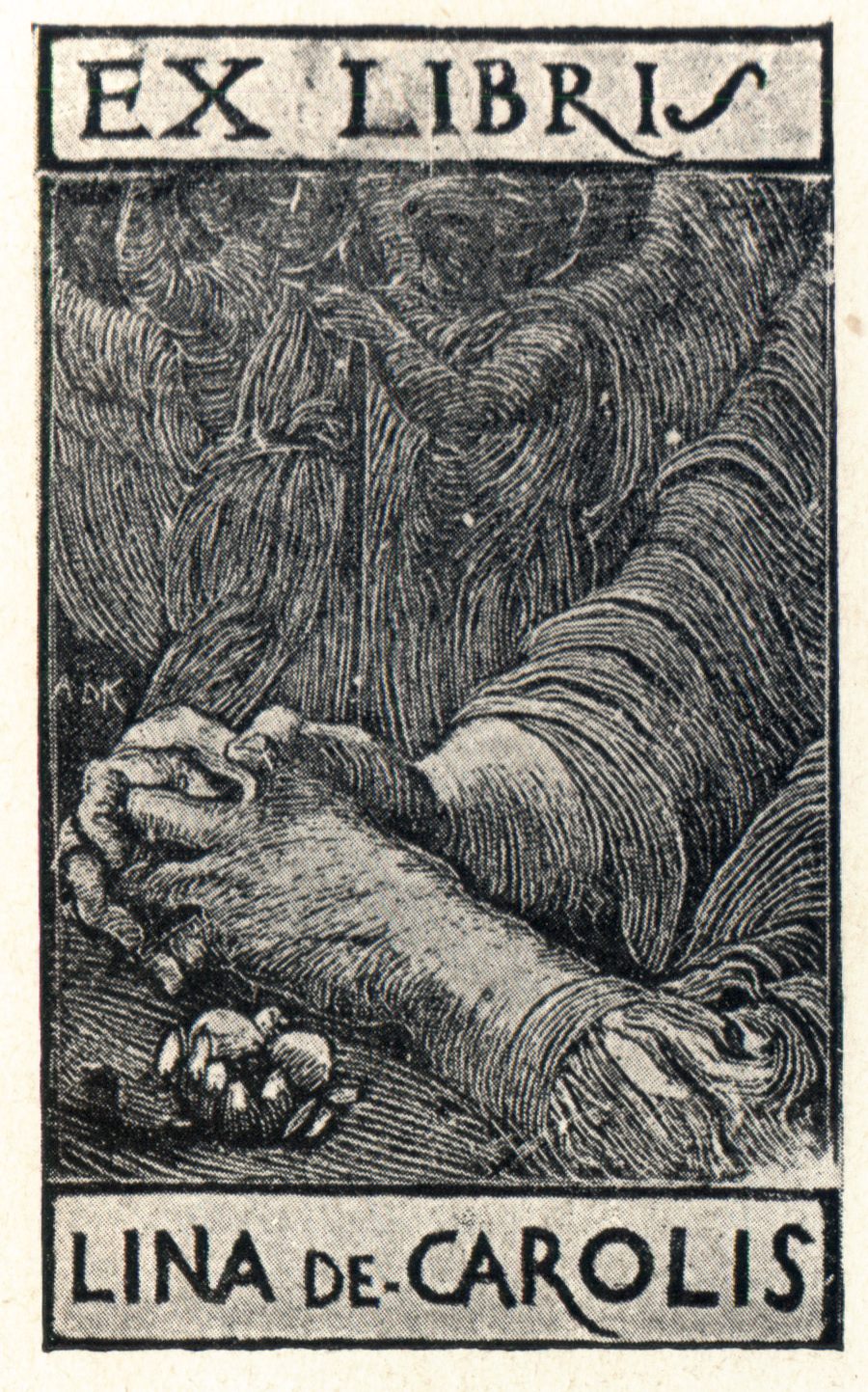 Adolfo De Carolis. Ex libris paa Lina De Carolis